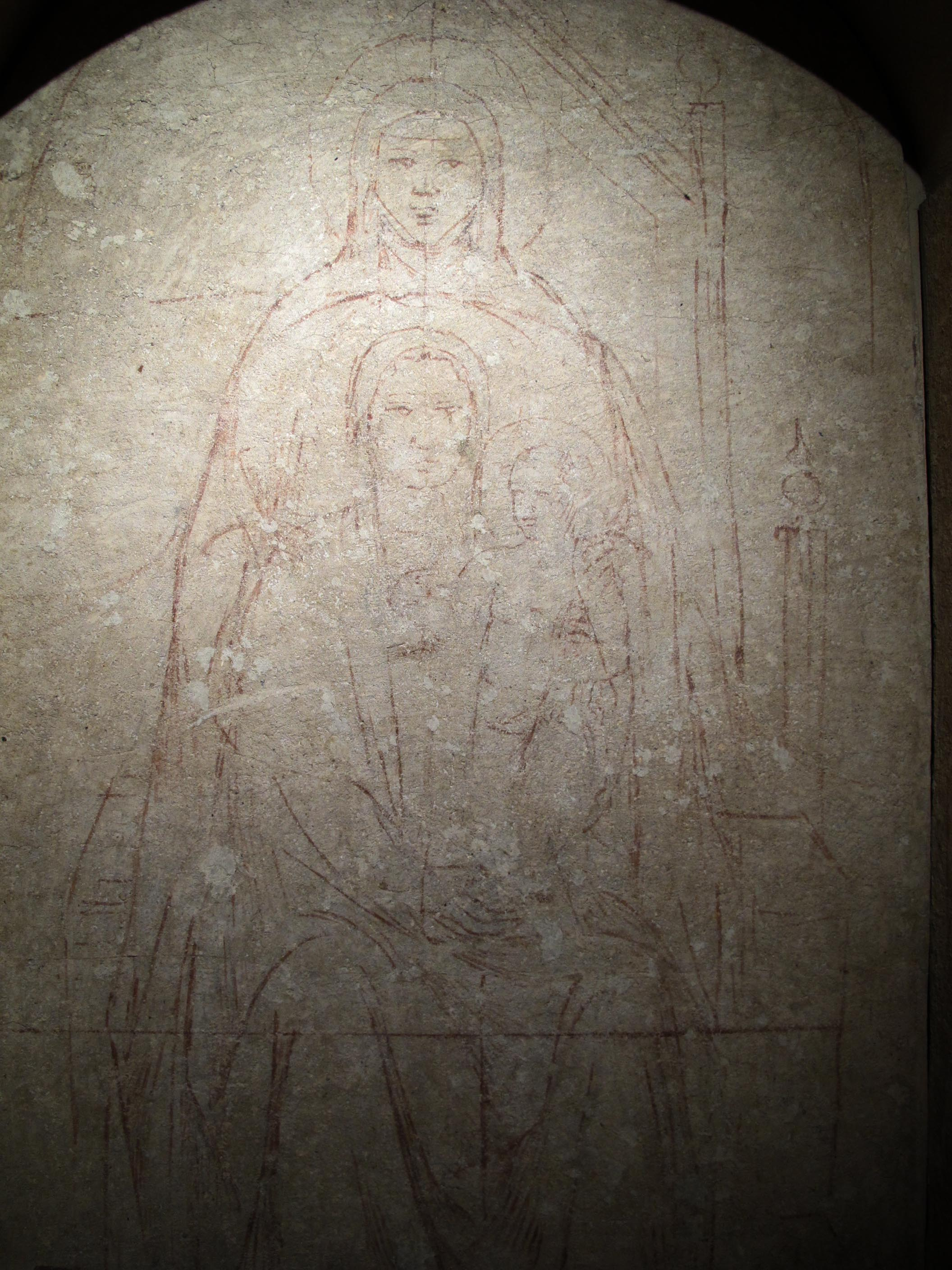 da tabernacolo di sant'anna a figline detail